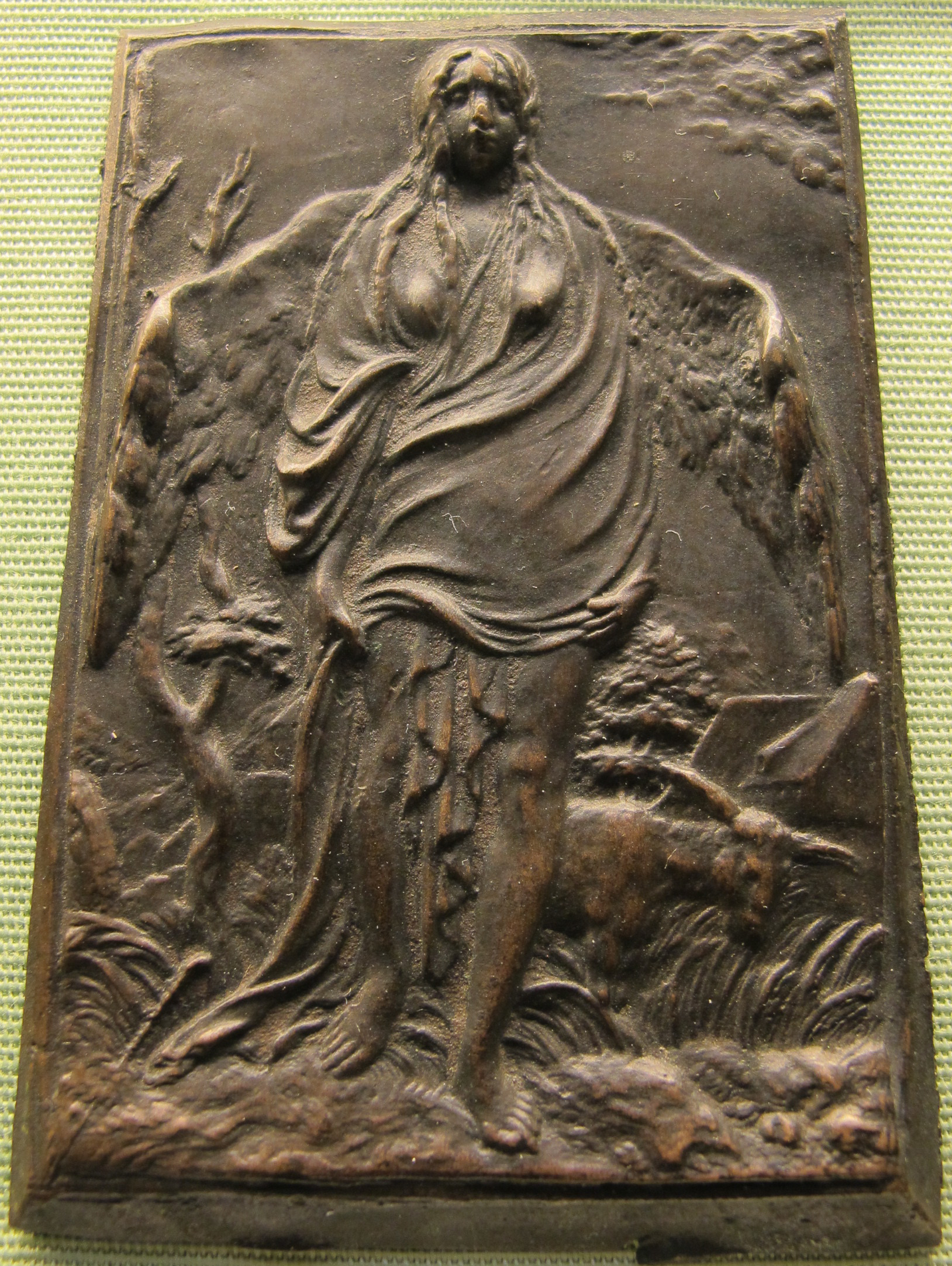 Peter flötner, i sette peccati capitali, accidia, 1540 ca